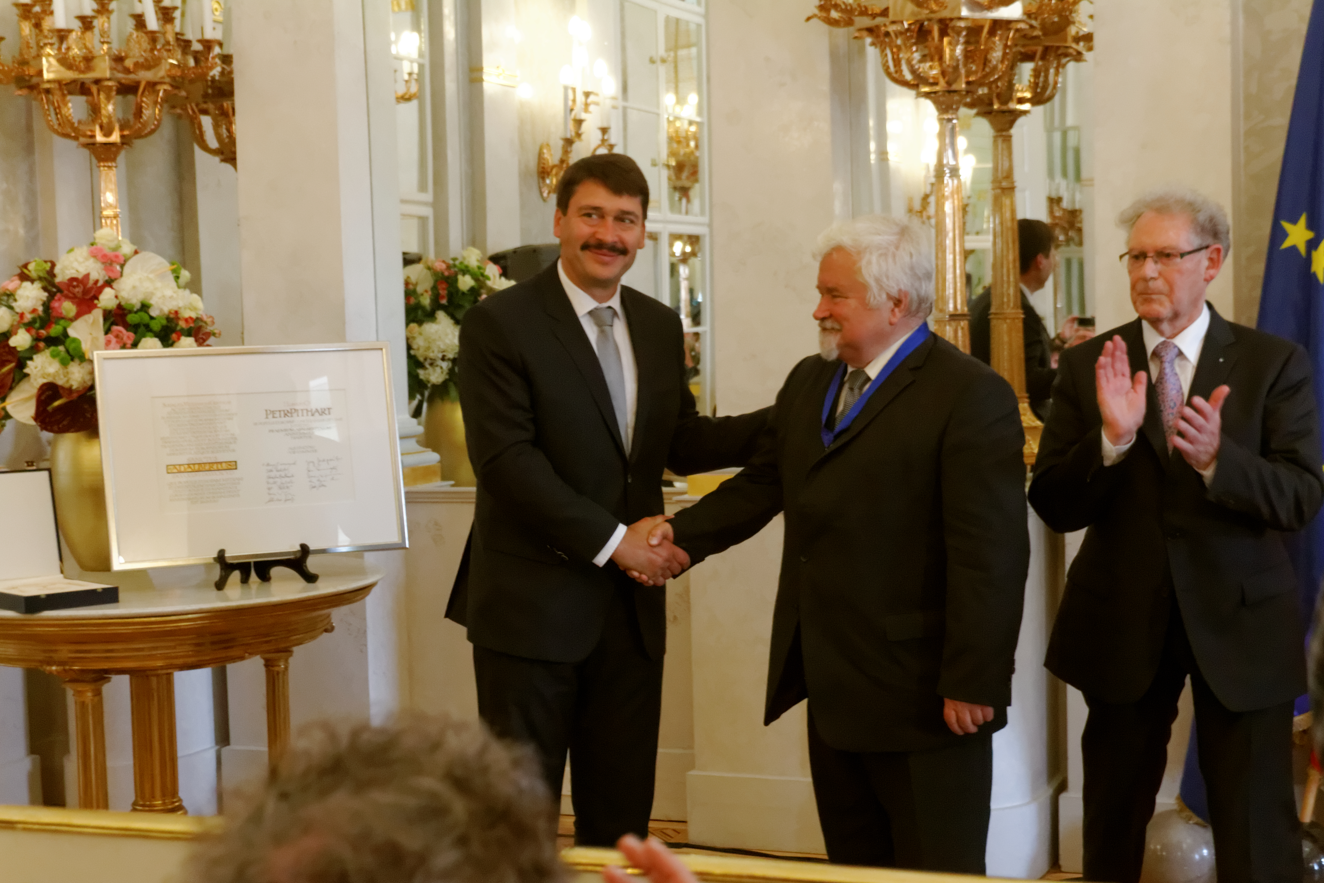 János Áder bei der Übergabe des Adalbert-Preises im Sandor-Palais Budapest mit Dr. Petr Pithart (Mitte), Prof. Hans Süßmuth (rechts)